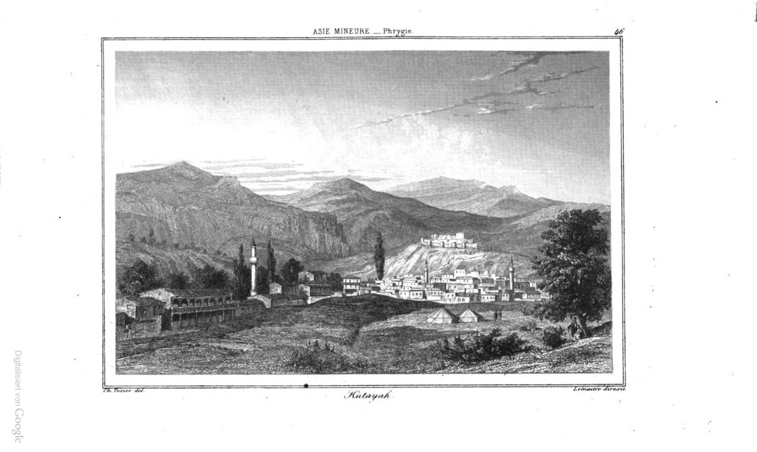 Kütahya mit Burg, Stadt in der Türkei, Zeichnung von Charles Texier